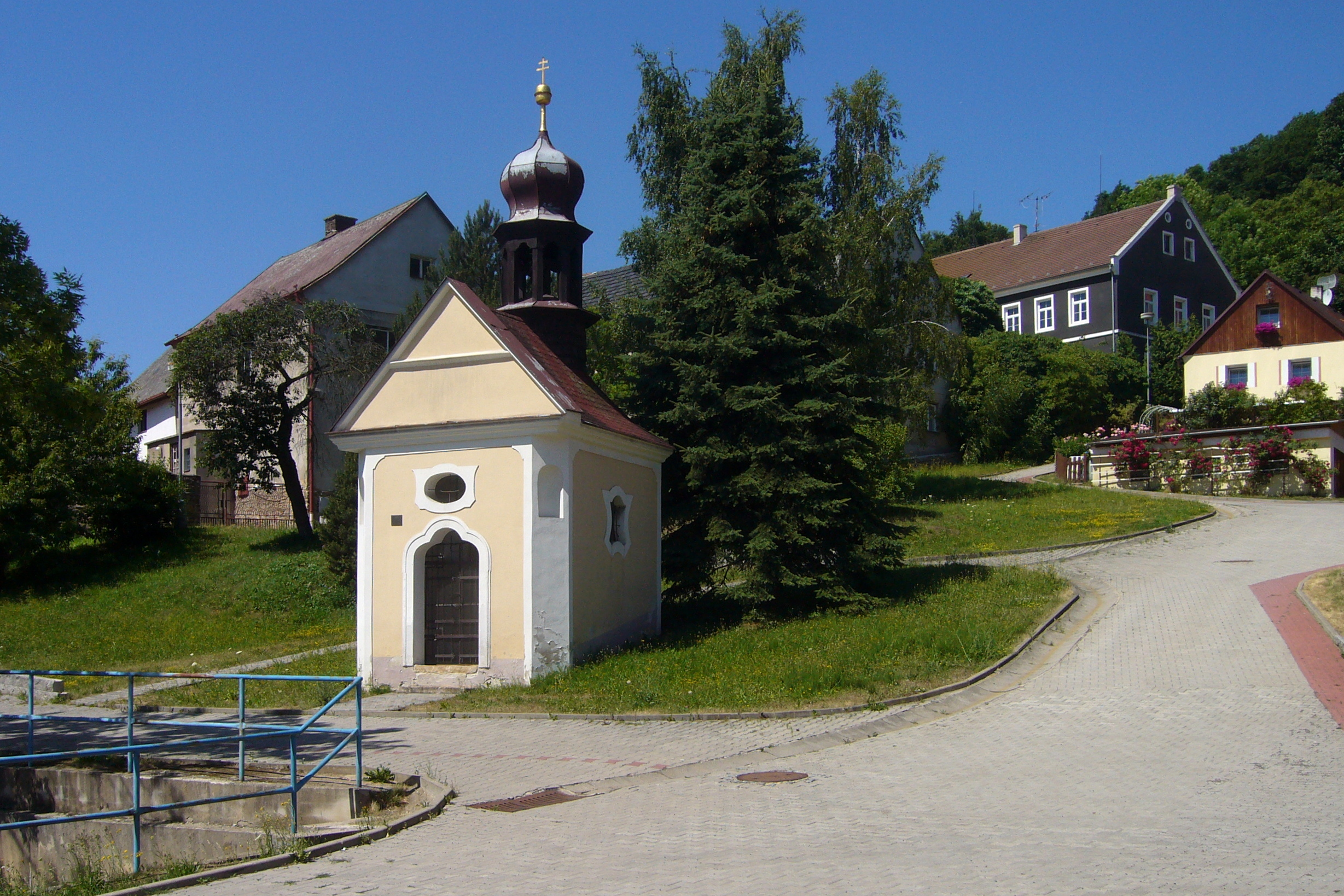 Vinařice - náves s kaplí Nejčistšího srdce Panny Marie